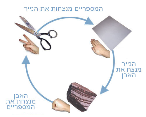 אבן נייר ומספריים